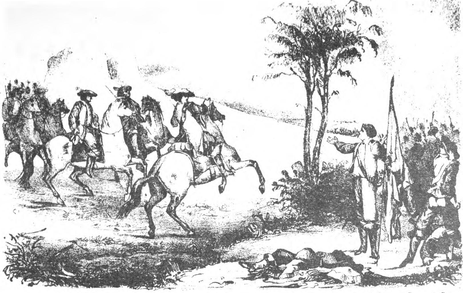 Batalha dos Guararapes (abril de 1648).